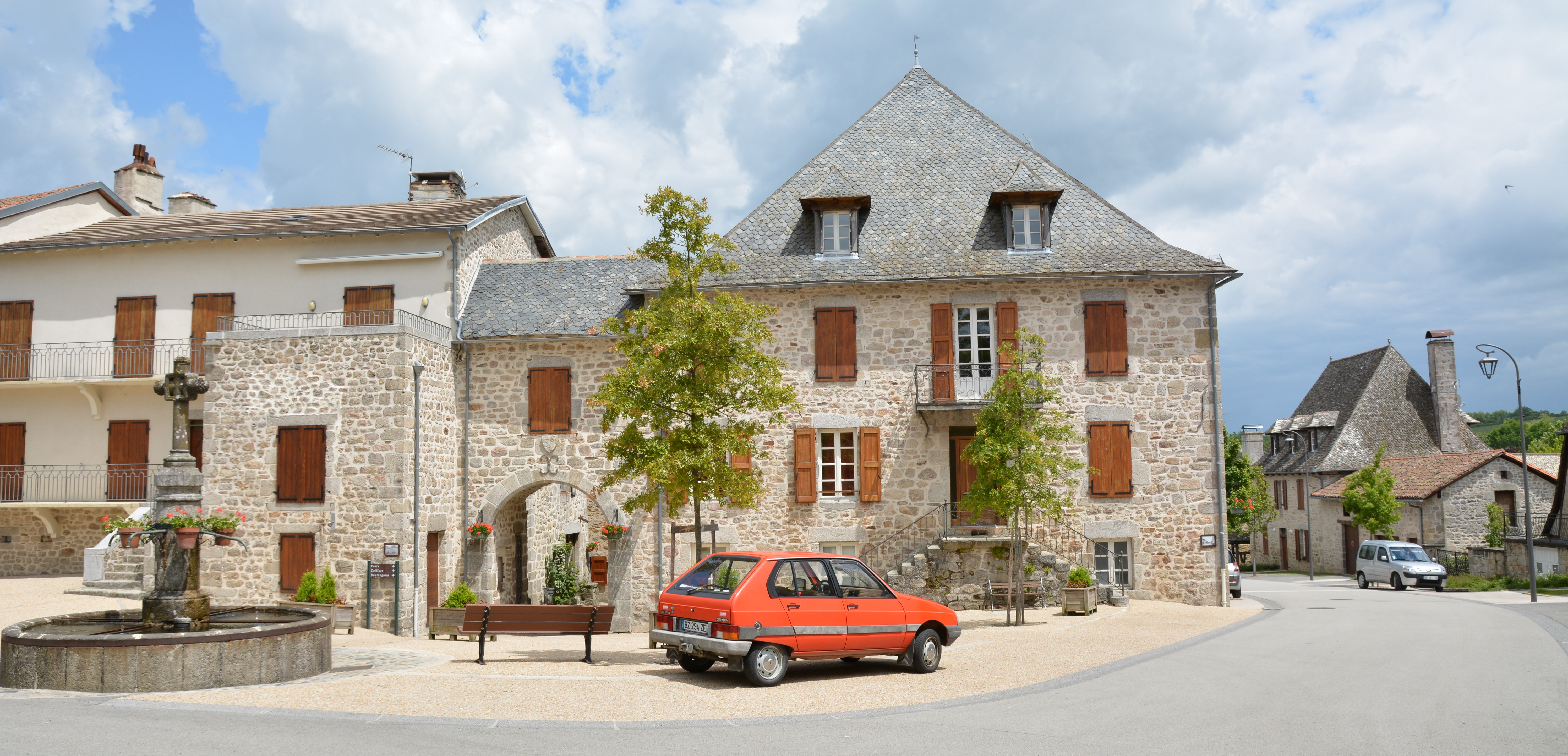 Village de Marcolès, Cantal, Auvergne, France